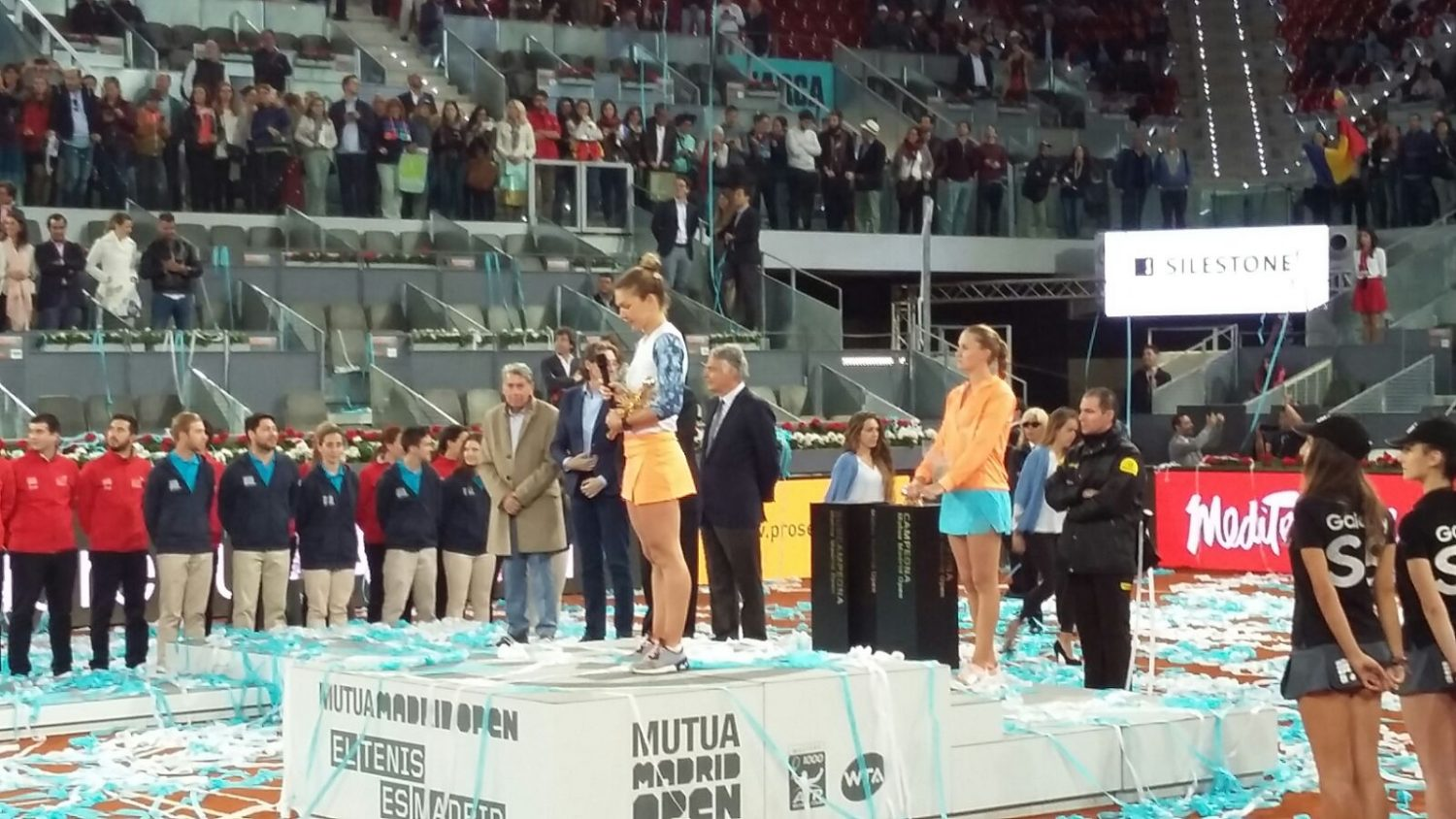 La primera teniente de alcalde del Ayuntamiento de Madrid y concejala del Área de Equidad, Derechos Sociales y Empleo, Marta Higueras, ha sido la encargada de entregar ayer el premio a la subcampeona del Mutua Madrid Open femenino. La triunfadora, la rumana Simona Halep, revalidó su título Mutua Madrid Open en la Caja Mágica ante la francesa Kristina Mladenovic.